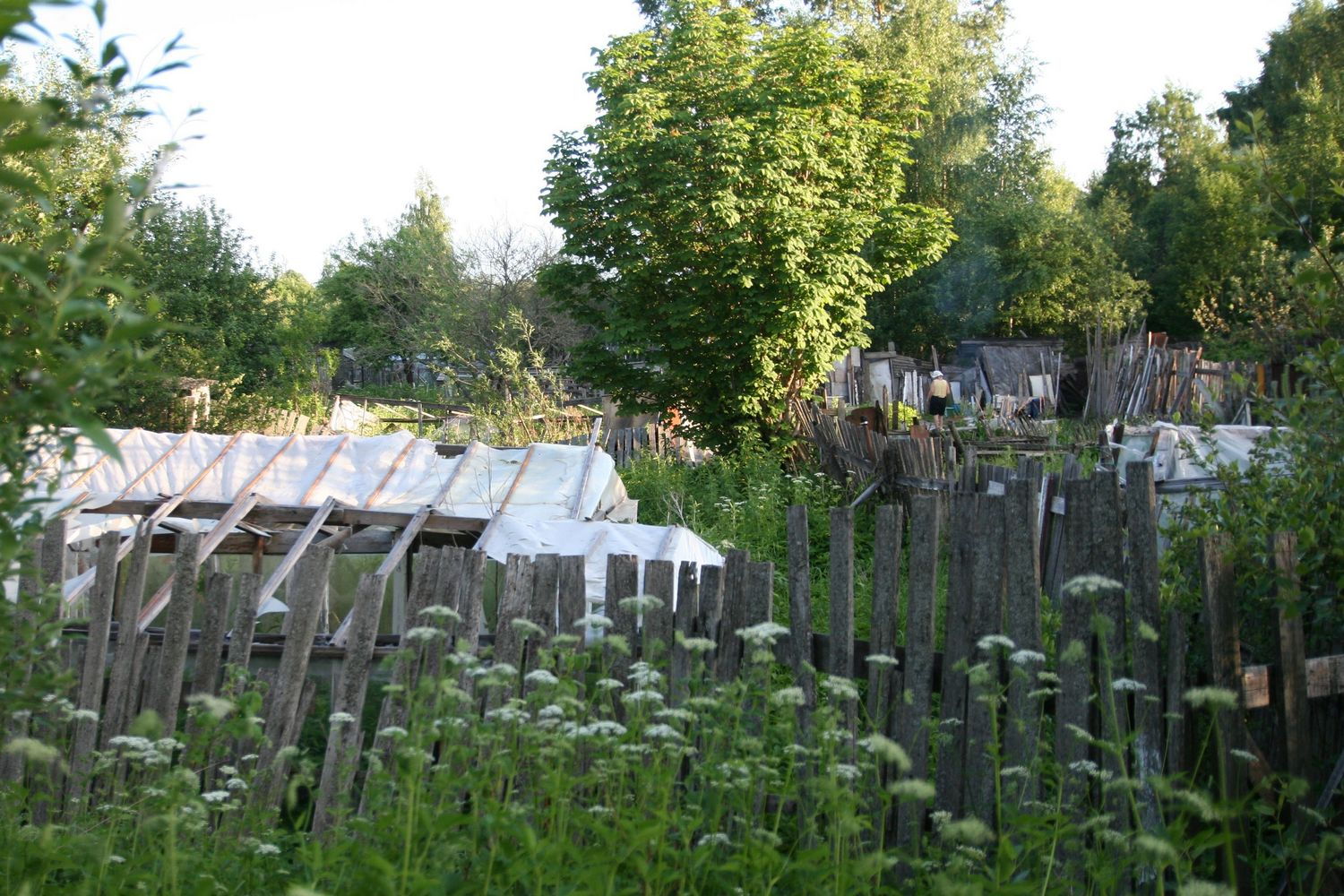 Hiinalinn.